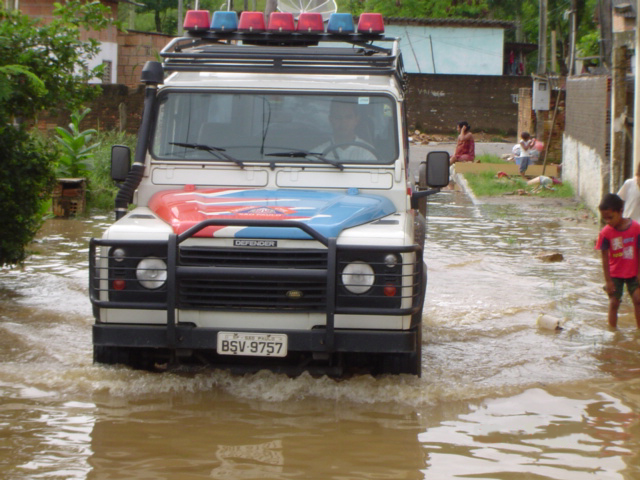 Veículo especial utilizado nas ações de Defesa Civil no Estado de São Paulo - Brasil.